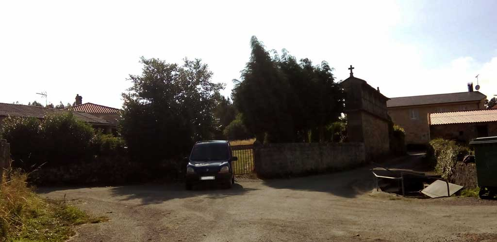 Vista de Vilardois, Curtis.